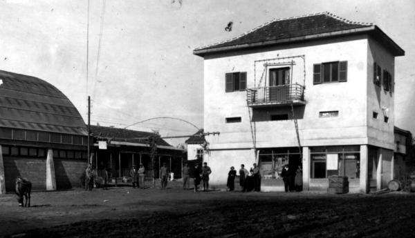 מראה של אחד הבתים שנבנו בחדרה בשנות השלושים